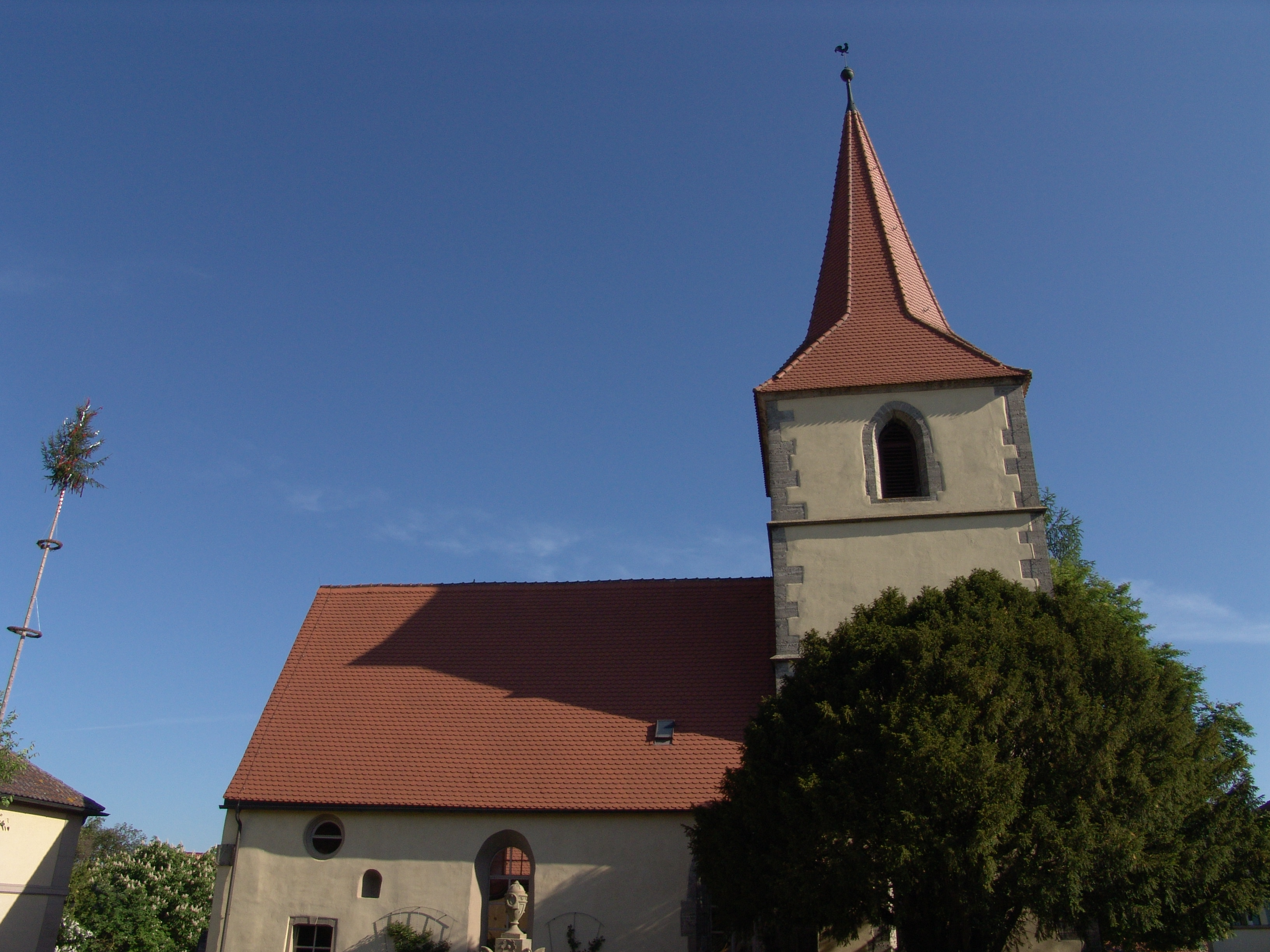 evang.-luth. Kirche St. Johannis in Ohrenbach